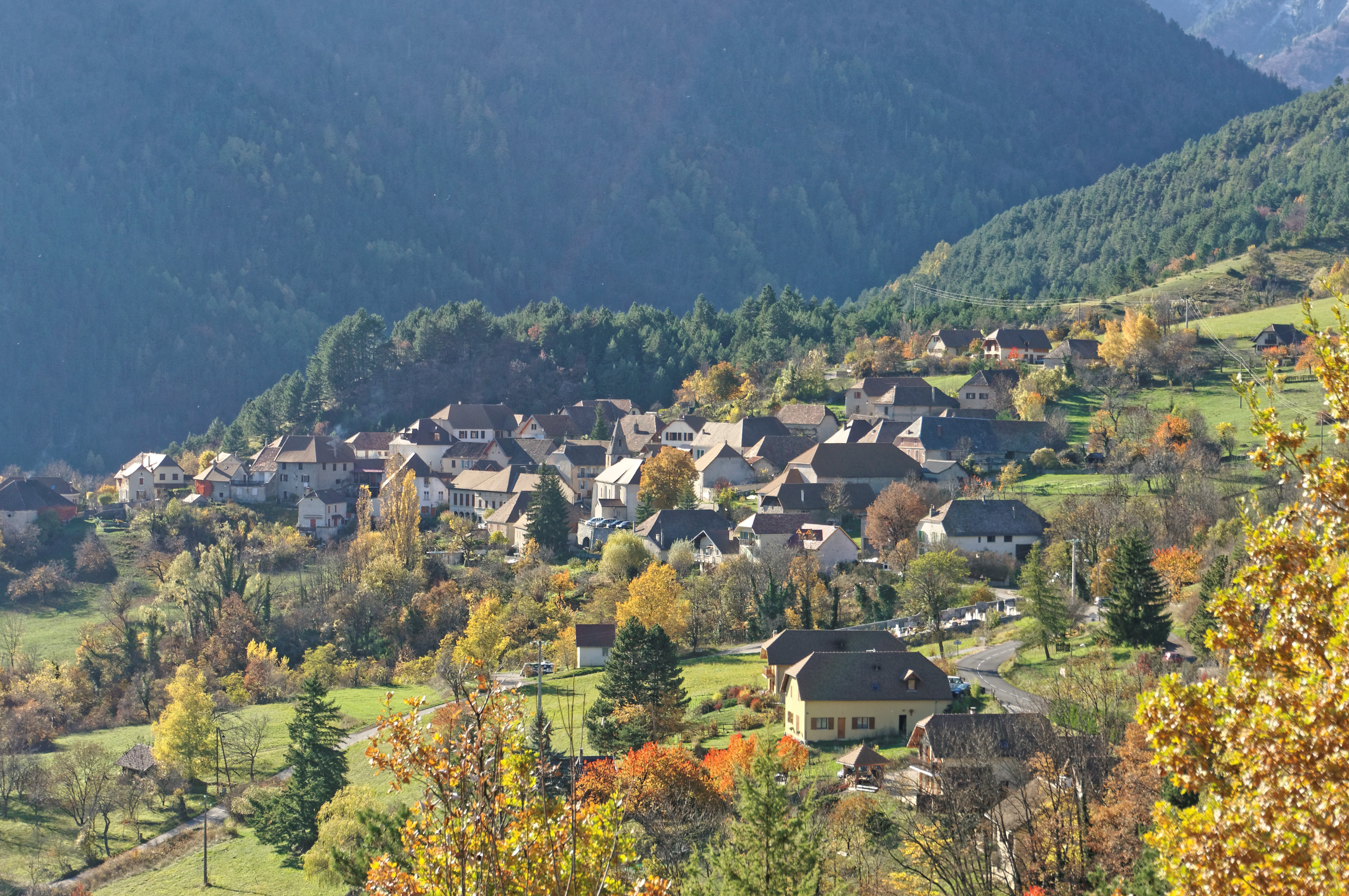 Le village de Saint-Michel-les-Portes